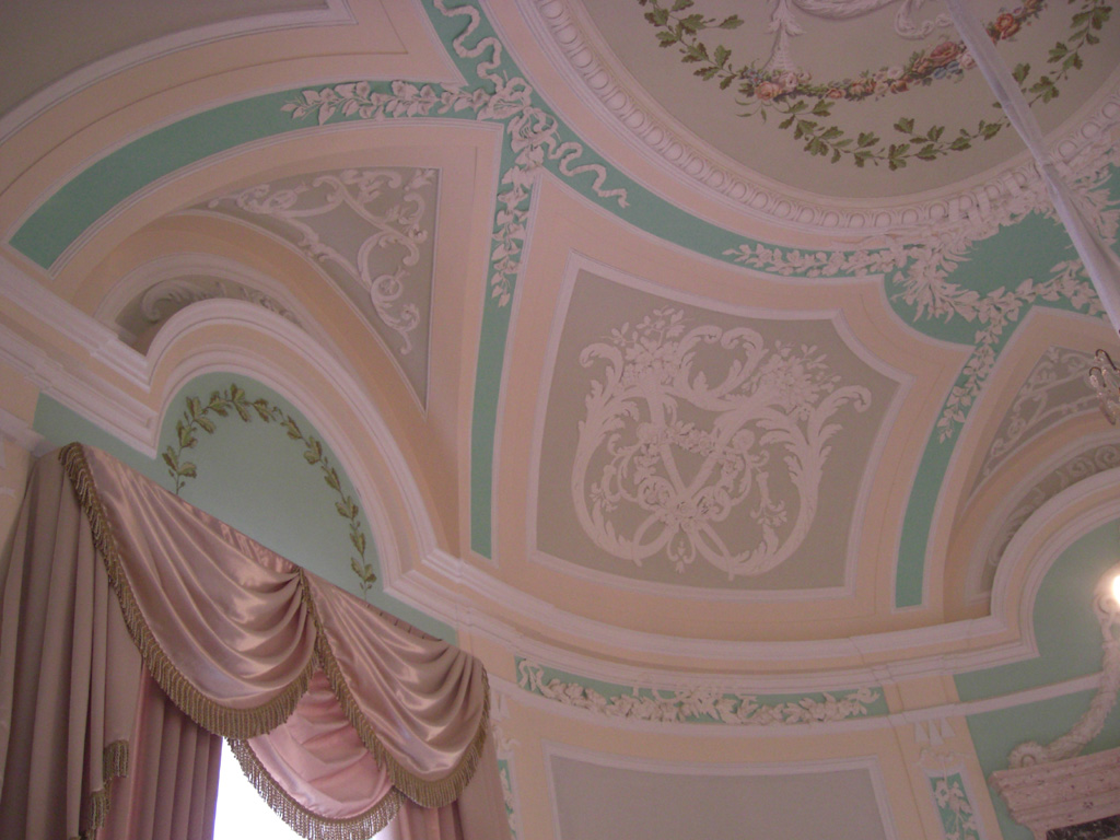 Овальный будуар в Большом Гатчинском дворце